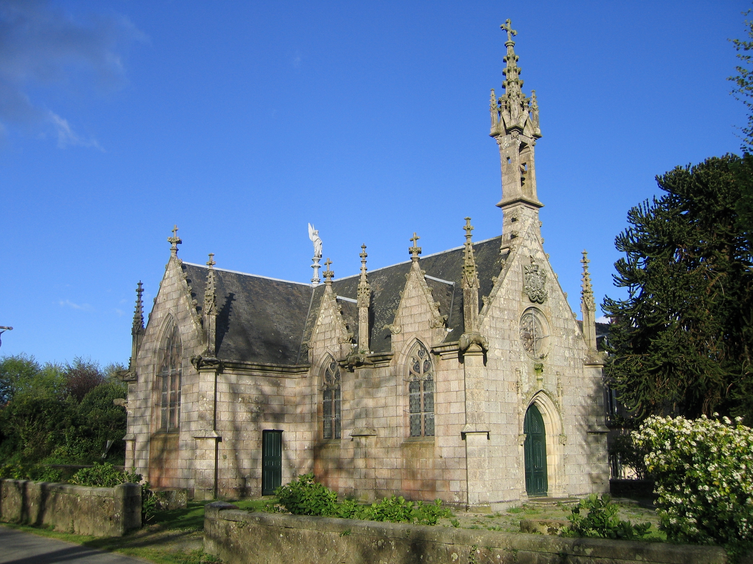 La chapelle Saint-Jacques sur la commune de Guiclan dans le Finistère - France